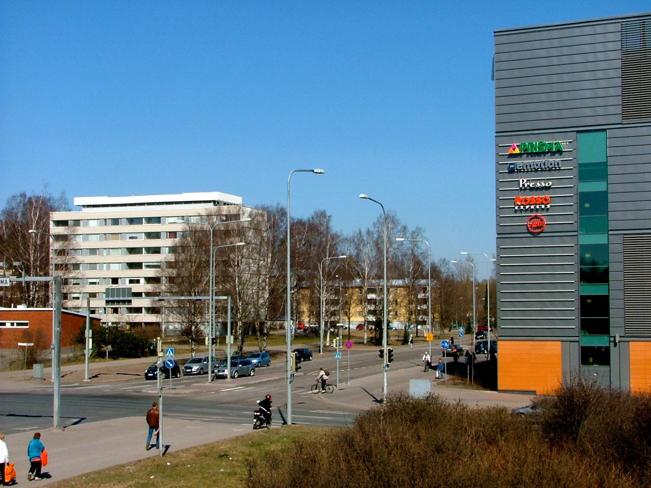 Vasemmalla Puotinharjun 60-luvulla rakennettuja asuintaloja ja oikealla maaliskuussa 2009 avattu Prisma Itäkeskus (joka myös sijaitsee Puotinharjun alueella). Etualalla on Kehä I:n ja Vanhanlinnantien risteys.